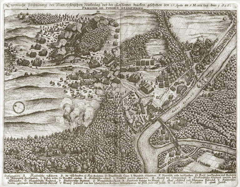 Eigentliche Vorbildung der Mansfeldischen Niederlag bey der Dessawer brücken